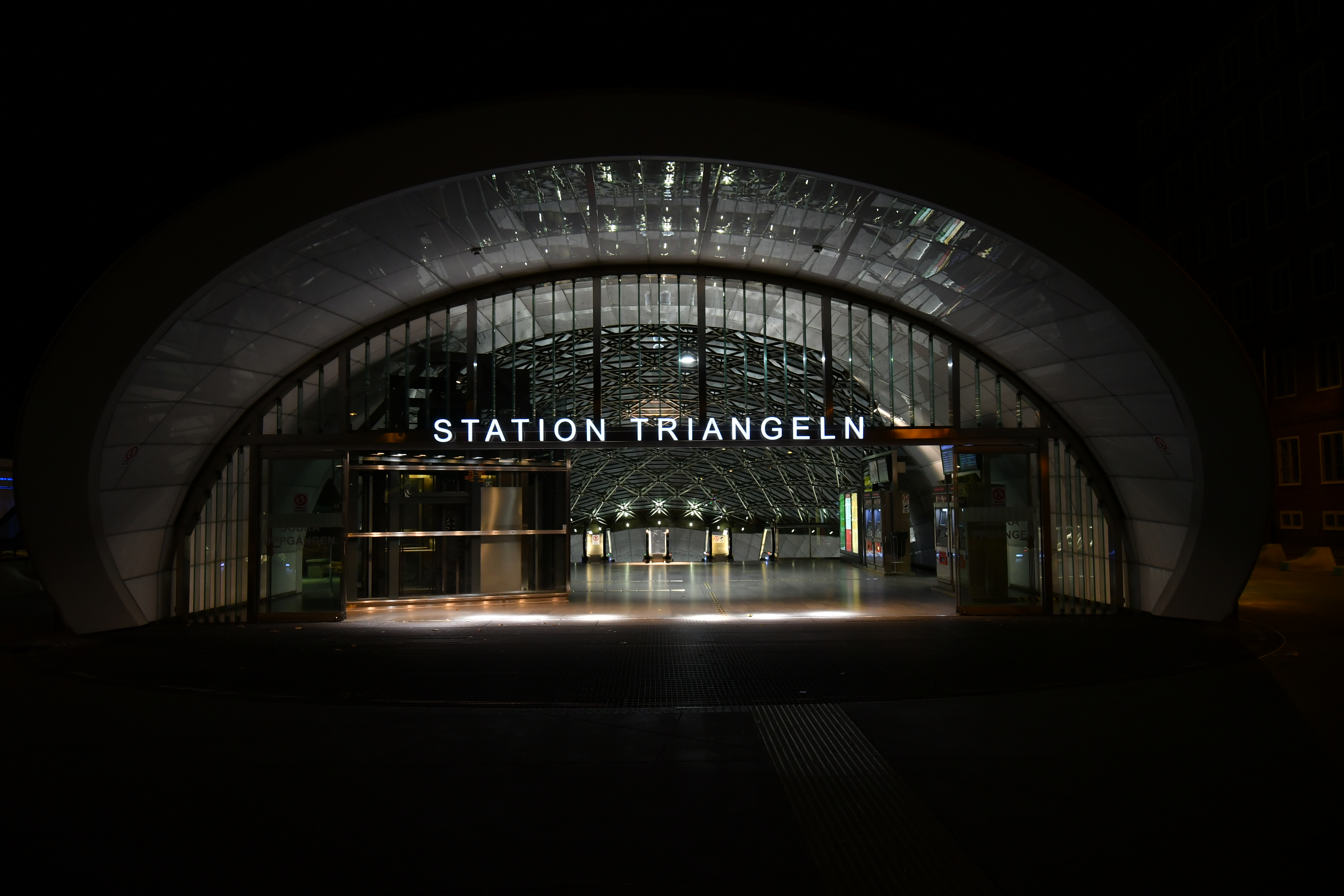 Triangelns station, södra uppgången nattetid.